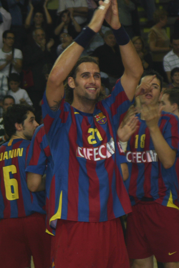 Lars Krogh Jeppesen, jugador d'handbol danès. Fotografia del dia 5 de novembre de 2005, en un partit de la Lliga Europea al Palau Blaugrana de Barcelona.